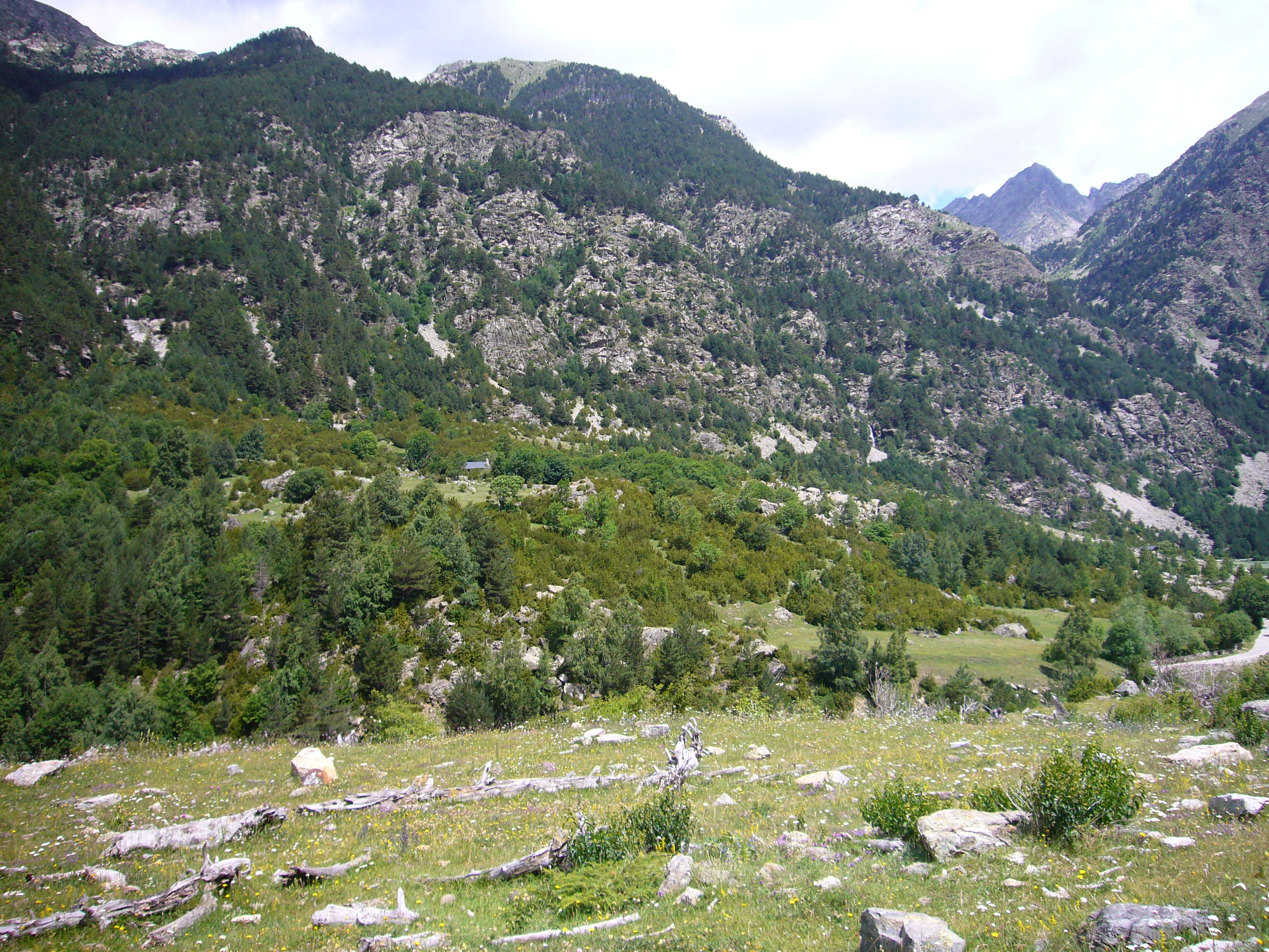 A la part superior, d’esquerra a dreta: Roques Punxentes, Cap de Copiello i Vall de Sarradé. Ribagorça, Catalunya